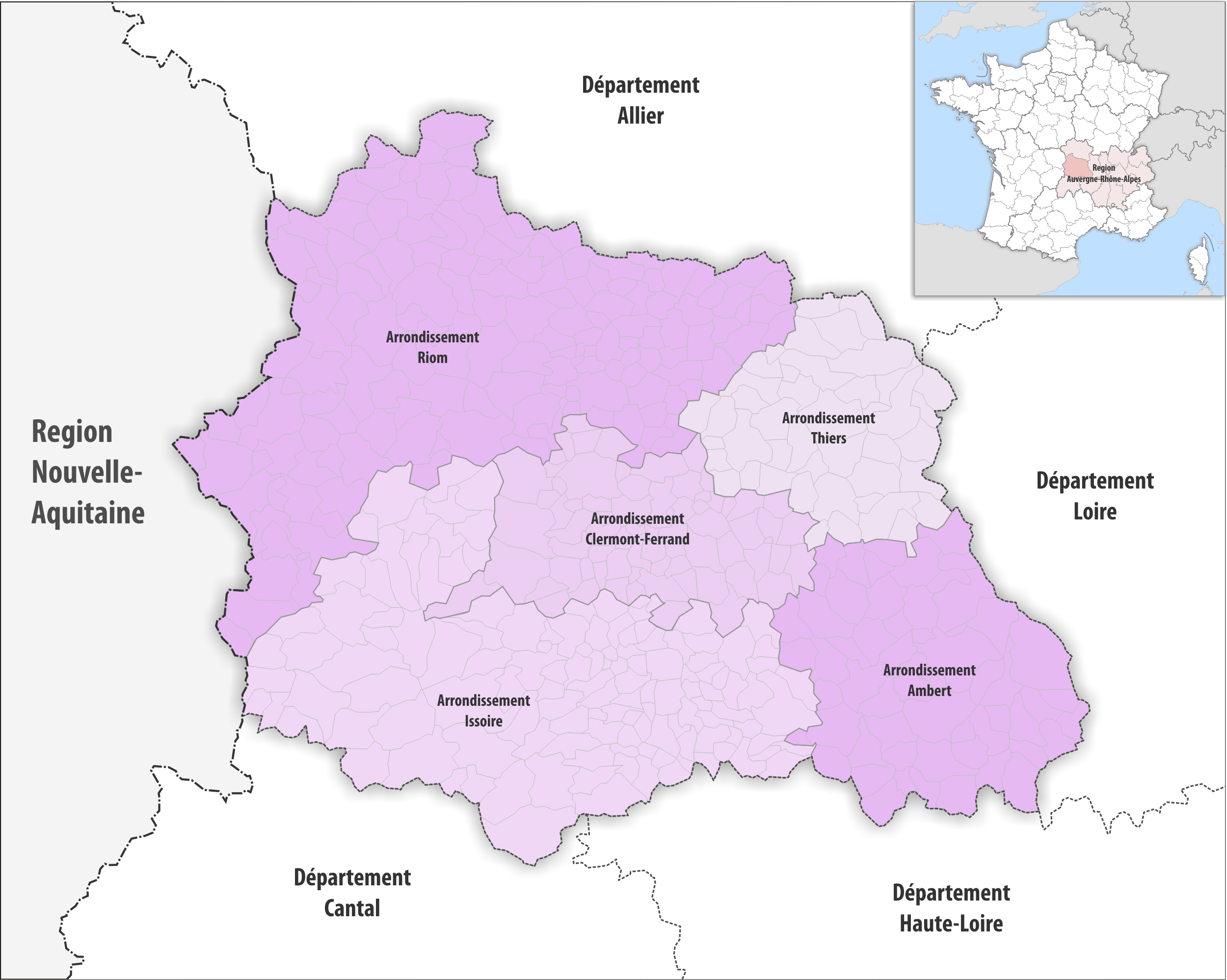 Gemeinden und Arrondissemente im Departement Puy-de-Dôme